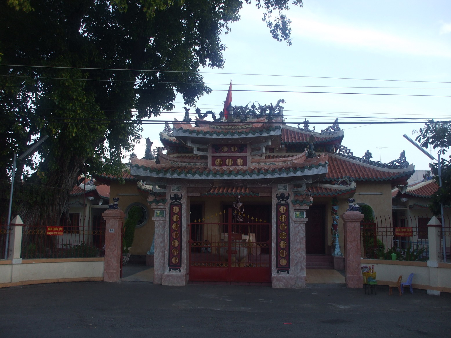 Đền thờ chính thờ Nguyễn Trung Trực, tại TP. Rạch Giá (Kiên Giang Việt Nam).